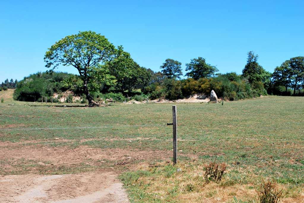 Castro de Fisteus, Curtis.